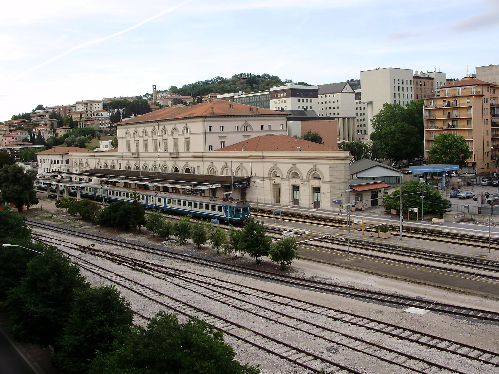 La stazione di Perugia-Fontivegge vista da via Sicilia